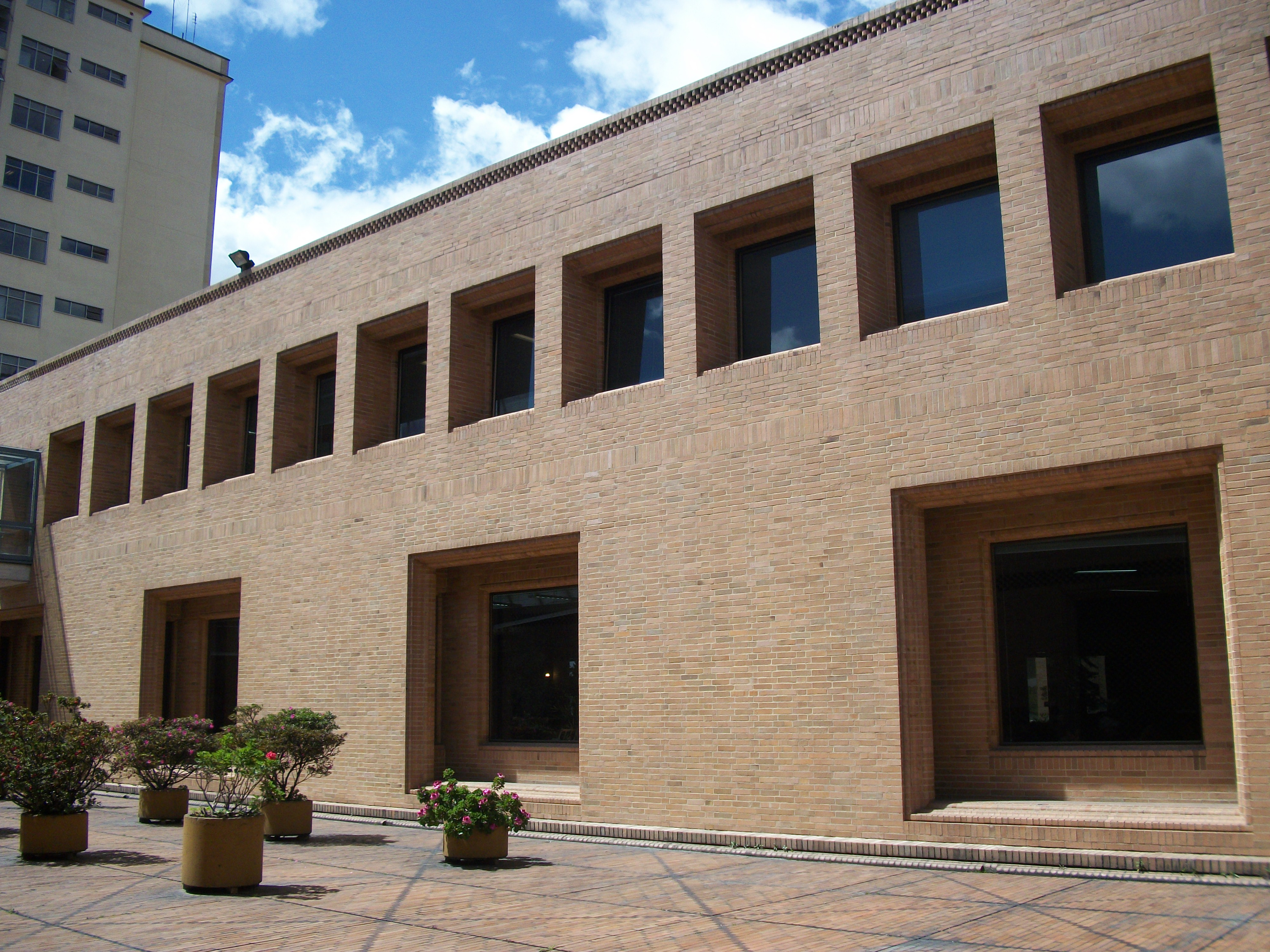 Parte posterior del cuerpo norte del Archivo General de la Nación en la carrera 6 con calle 6, en Bogotá (Colombia).